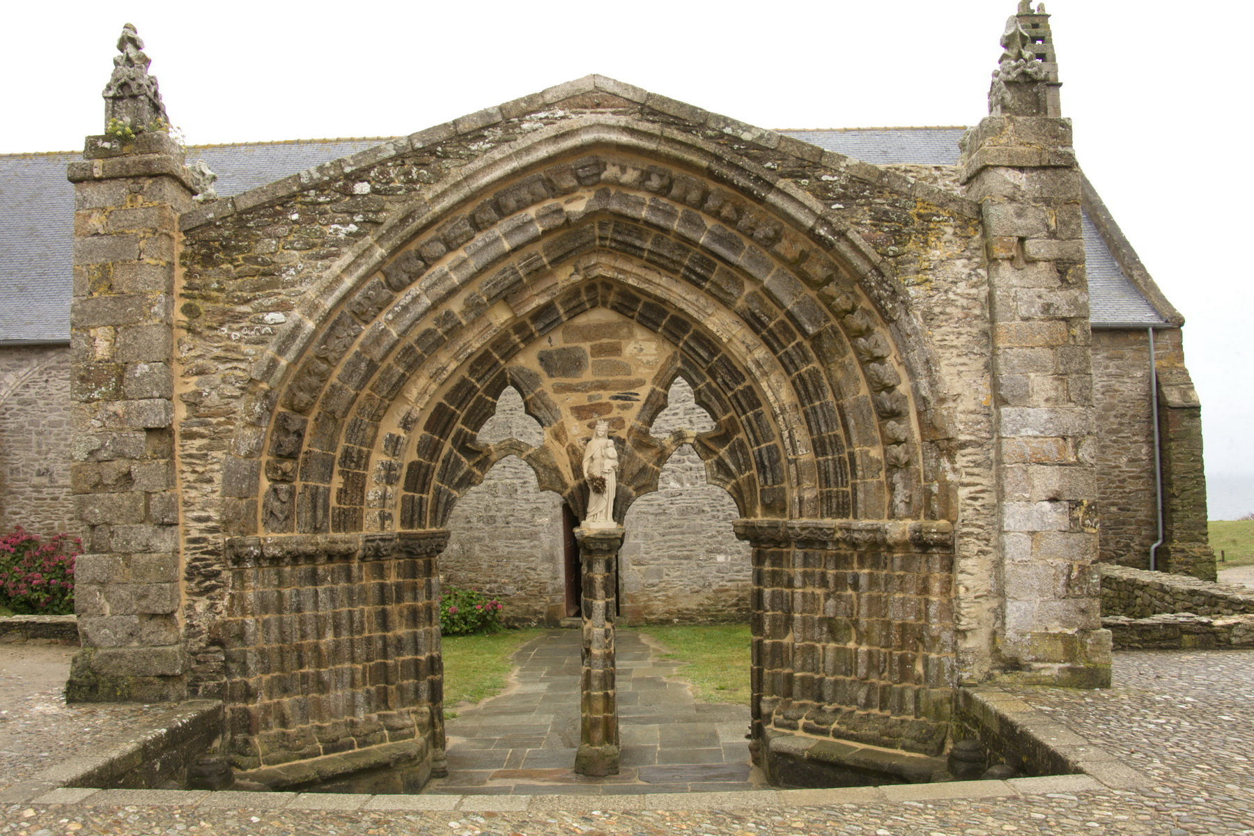 Abbaye Saint-Mathieu de Fine-Terre (Classé) .